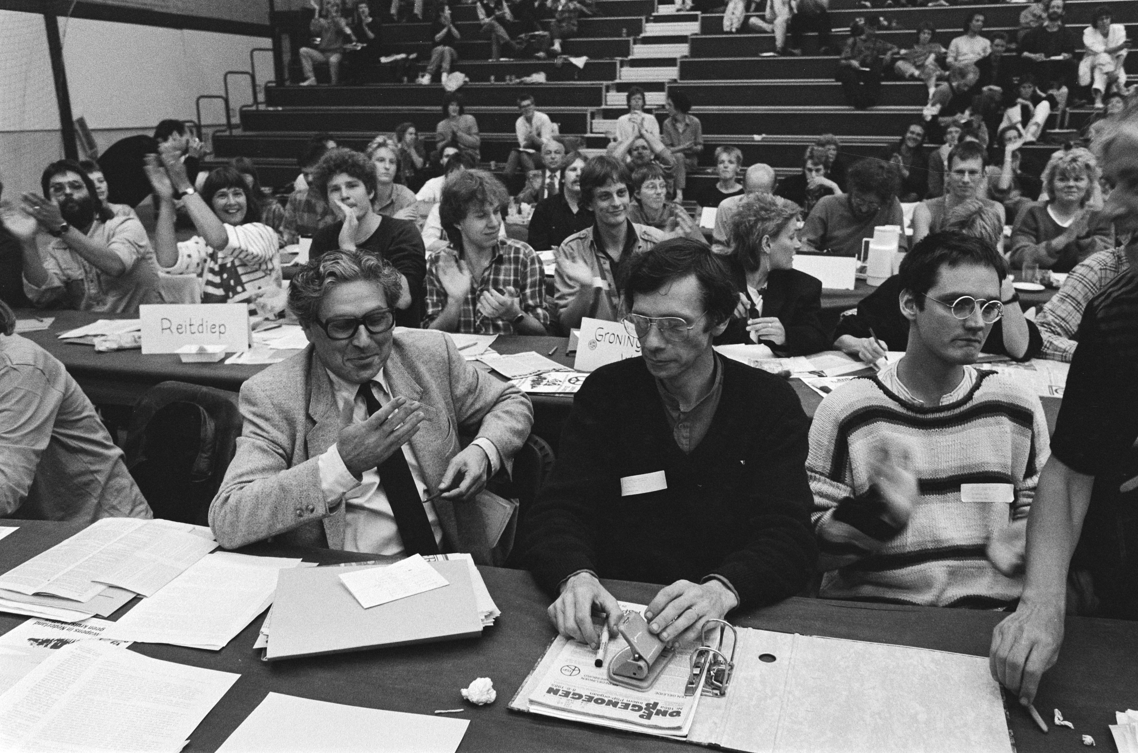 Collectie / Archief : Fotocollectie Anefo Reportage / Serie : [ onbekend ] Beschrijving : PSP-congres in Utrecht, opluchting bij Fred van der Spek na de uitslag van de stemming Annotatie : De stemming betrof samenwerking met andere kleine linkse partijden, waar Van der Spek tegen was. Voorstander was de latere partijleider Andree van Es. Datum : 29 juni 1985 Locatie : Utrecht (stad) Trefwoorden : conferenties, politici, politieke partijen Persoonsnaam : Spek, Fred van der Fotograaf : Bogaerts, Rob / Anefo Auteursrechthebbende : Nationaal Archief Materiaalsoort : Negatief (zwart/wit) Nummer archiefinventaris : bekijk toegang 2.24.01.05 Bestanddeelnummer : 933-3653